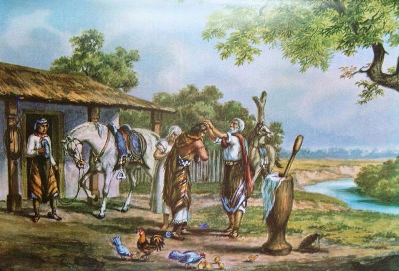 "El Gaucho Cristianador". Oleo de Adolf Methfessel, año 1836 (Berna (Suiza) - Buenos Aires 1909